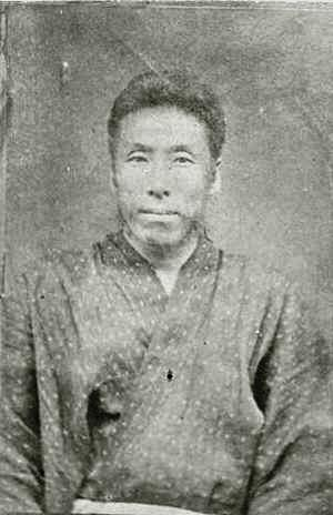 a Japanese man 桐野利秋 (Toshiaki Kirino)